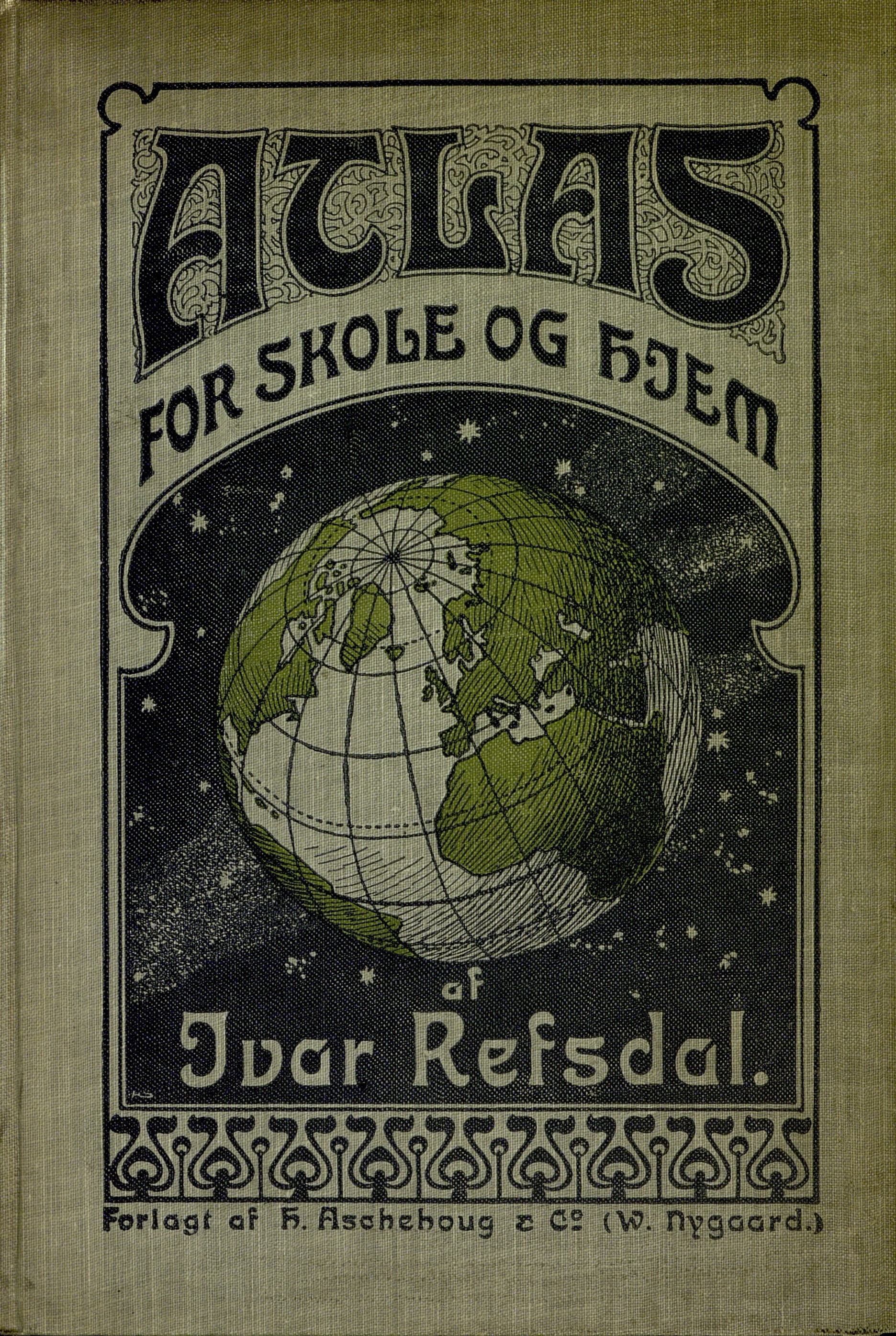 Omslaget til Ivar Refsdals "Atlas for Skole og Hjem" (1906)